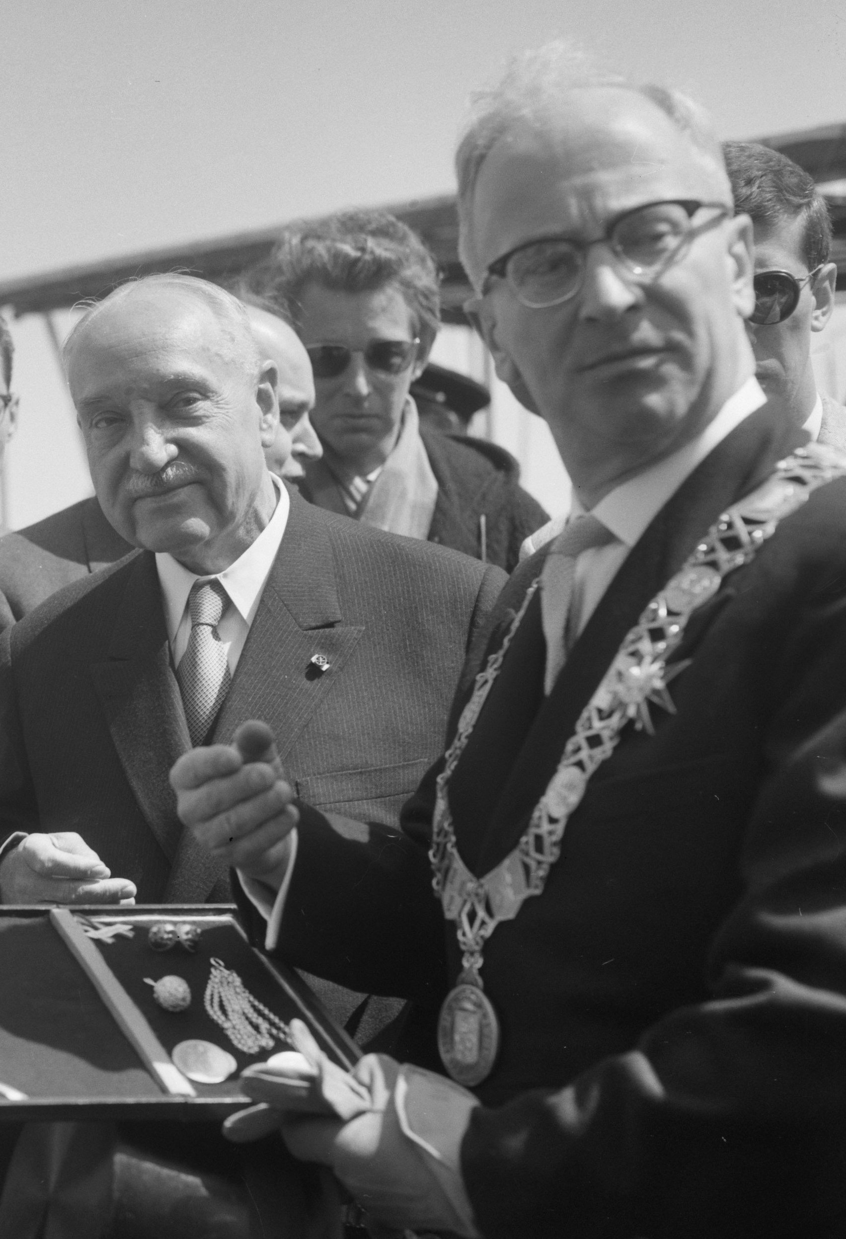 Collectie / Archief : Fotocollectie Anefo Reportage / Serie : [ onbekend ] Beschrijving : Bezoek Scharf aan Volendam. Scharf en de burgemeester Datum : 18 mei 1961 Locatie : Noord-Holland, Volendam Trefwoorden : bezoeken, burgemeesters Fotograaf : Bilsen, Joop van / Anefo Auteursrechthebbende : Nationaal Archief Materiaalsoort : Negatief (zwart/wit) Nummer archiefinventaris : bekijk toegang 2.24.01.04 Bestanddeelnummer : 912-4947 Reacties Geplaatst door Maaike op 26 maart 2014 - 22:30. Reportage: Staatsbezoek bondspresident Oostenrijk dr. Adolf Schärf Burgemeester mr. F.J.J.M. Boelens biedt een cassette met zilveren ornamenten aan die bij een Volendammer mannenkostuum behoren.